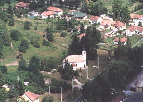 Bázakerettye, Zala County, Hungary, Szűz Mária neve római katolikus templom